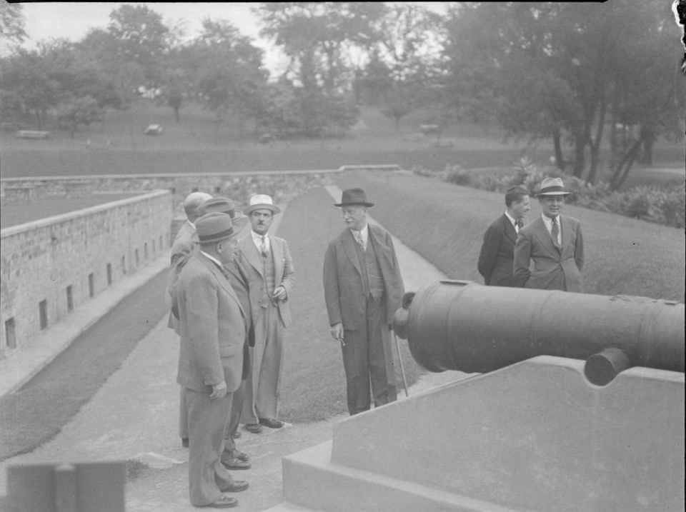 Visite officielle du lieutenant-gouverneur du Québec, Ésioff-Léon Patenaude, posant canne en main derrière un canon avec quelques personnalités à l'Île Sainte-Hélène.